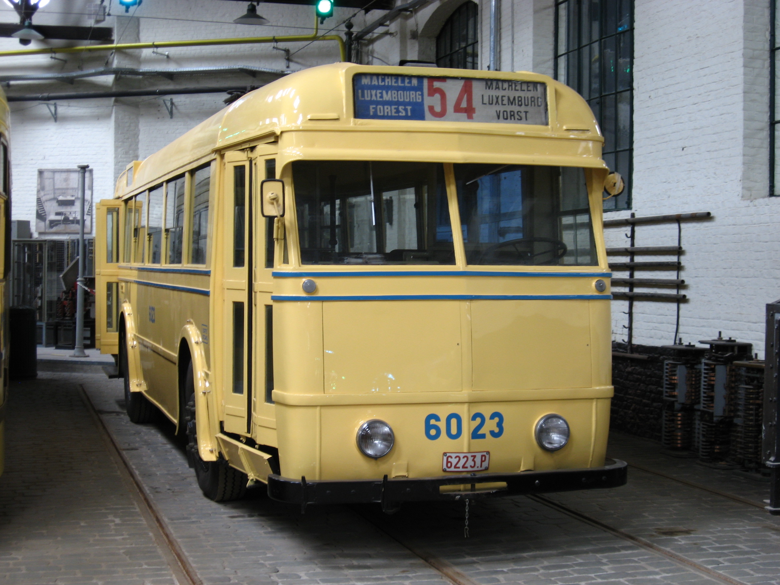 Brusselse trolleybus 54 in het Brussels OV museum